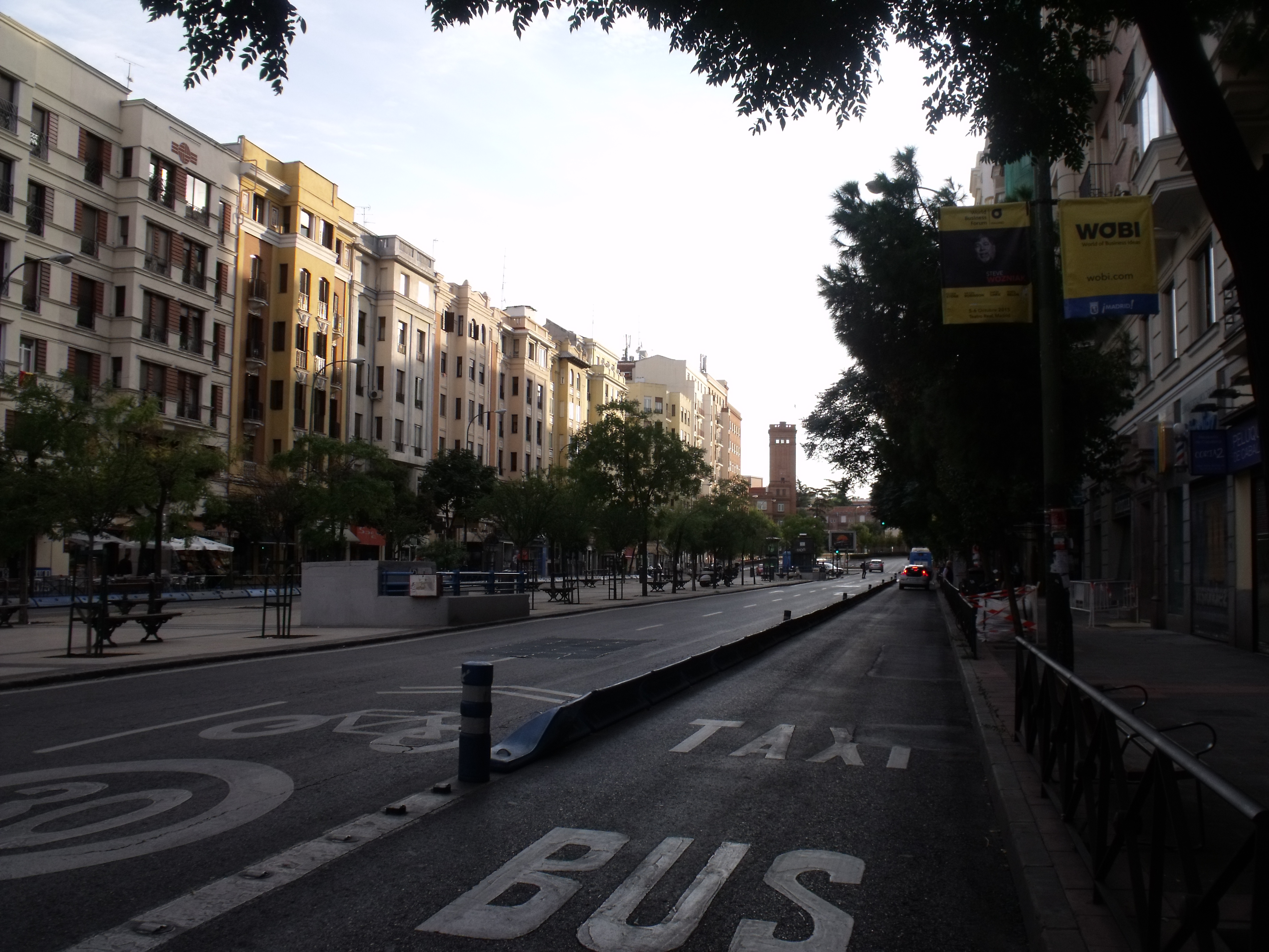 Avenida Reina Victoria, Madrid